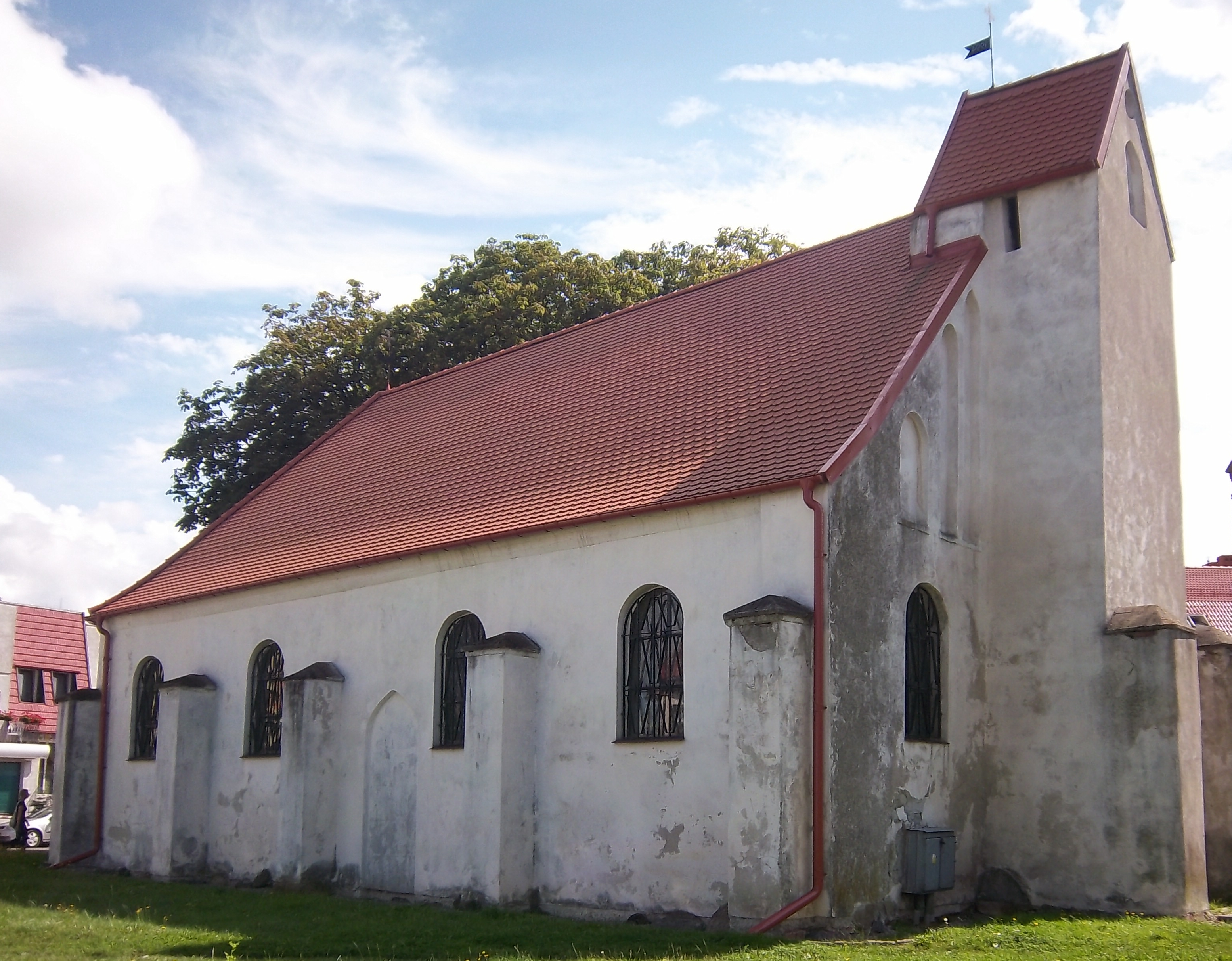 Darłowo, ul. Bogusława X - dawna kaplica szpitalna p.w. św. Jerzego, ob. kościół ewangelicki